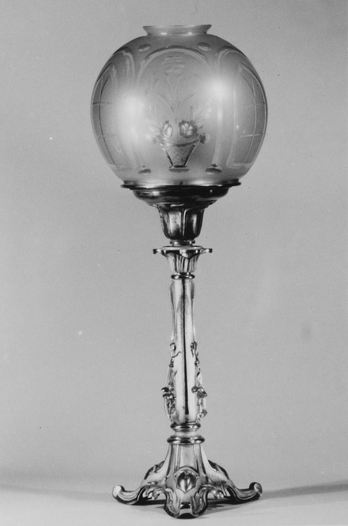 American; Astral lamp; Metal